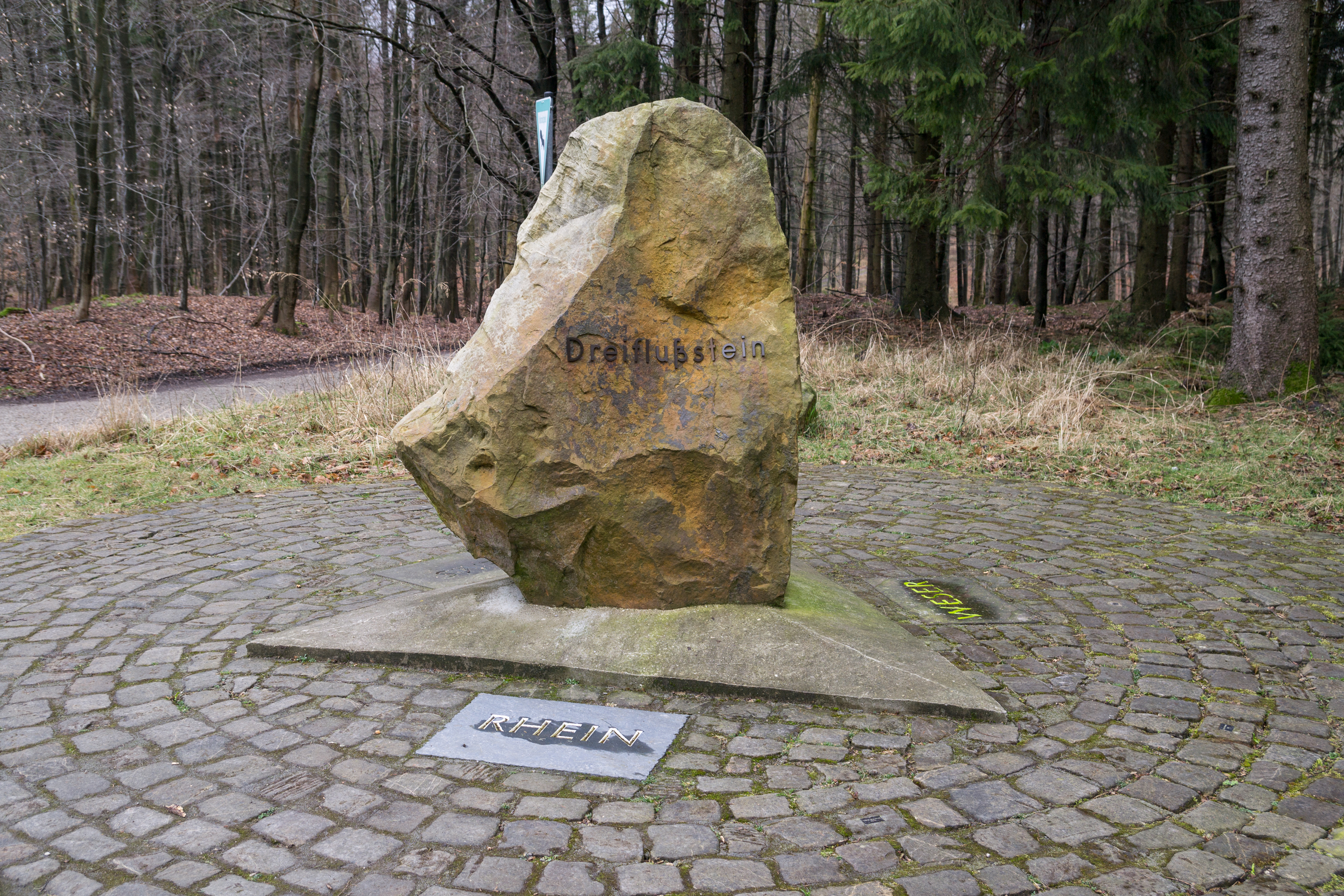 Dreiflussstein am Detmolder Klöppingsberg